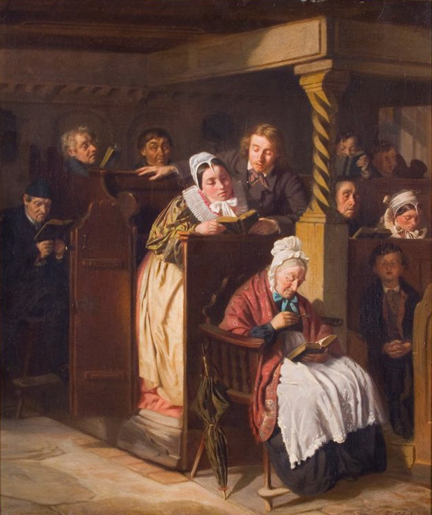 Sonntagsmorgen-Gottesdienst. Öl auf Leinwand. datiert 83(53?). 54 x 46 cm